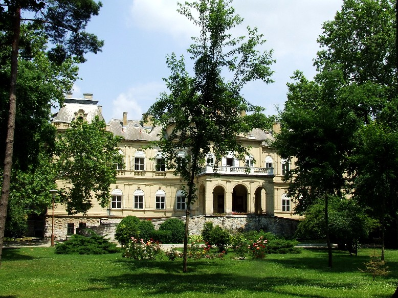 Andrássy-kastély, Tóalmás